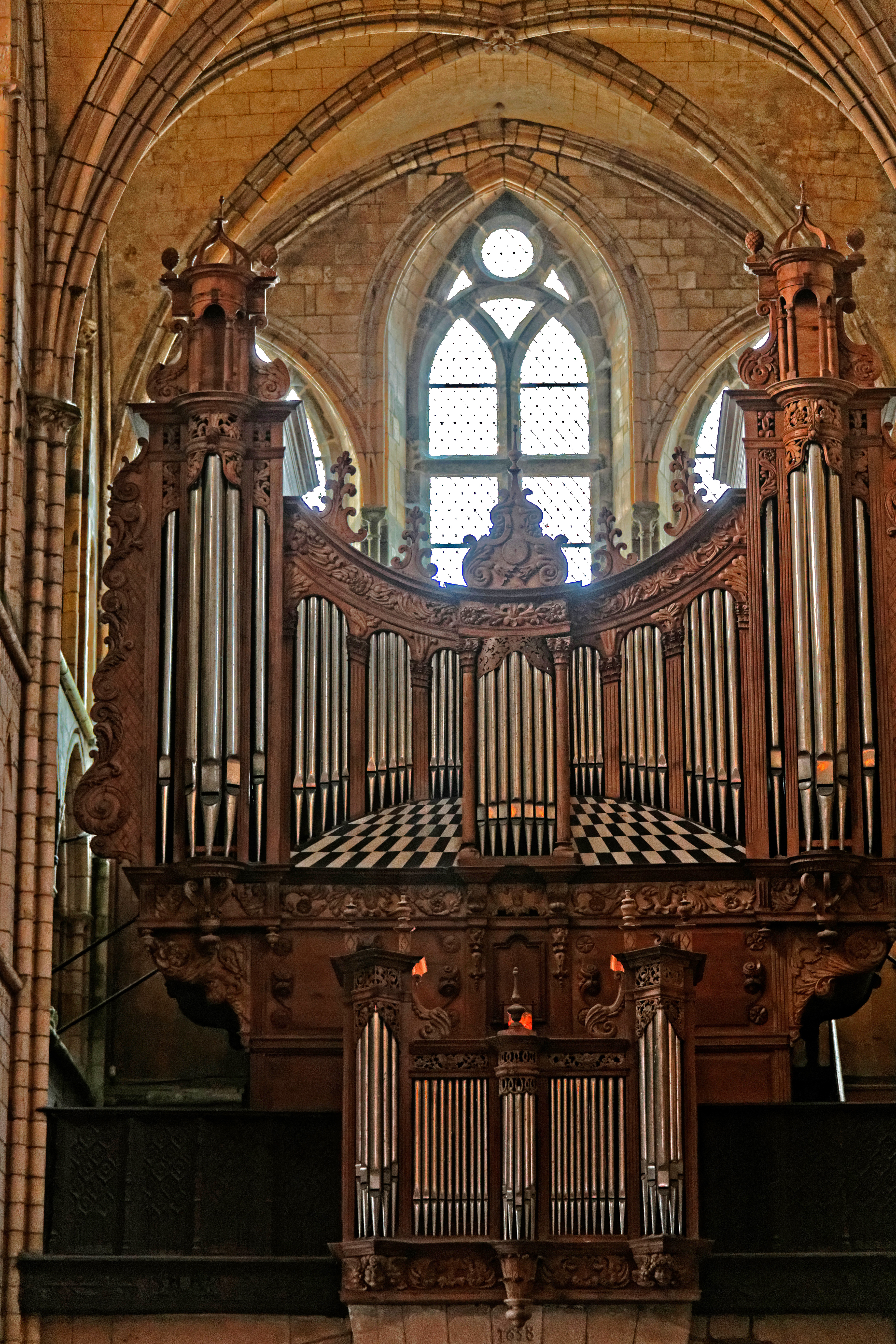 Grand orgue de la Cathédrale Saint-Paul-Aurélien de Saint-Pol-de-Léon (29, Bretagne) construit par les anglais Robert et Thomas Dallam (1660).